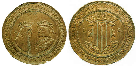 Cien Ducados de Oro (350 gramos y 82 milímetros de diámetro) Acuñada en 1528 en conmemoración del juramento de Carlos I (V del Sacro Imperio) como rey de Aragón. ANVERSO: Efigies enfrentadas de Juana I de Aragón y su hijo Carlos con coronas reales abiertas. Ceca de Zaragoza (C y A, de Caesar Augusta), "IOANA ET KAROLVS REGES ARAGONVM TRVNFATORES ET KATOLICIS". REVERSO: Señal Real de la Casa de Aragón (cuatro barras, en realidad palos o bastones de gules), en forma de piel o mapa de Aragón, timbrado de corona real abierta y sobre el nombre del Reino "ARAGONVM". Escudo en forma de pergamino imitando el mapa de Aragón con el Señal Real de la Casa de Aragón, timbrado de corona real abierta y en cartela el nombre del reino "ARAGONVM". Circunscrito: "IONA ET KAROLVS EIVS FILIVS PRIMO GENITVS DEI GRACIA RX". L y S que flanquean el escudo de Aragón, son iniciales que corresponden al grabador, Luis Sánchez.